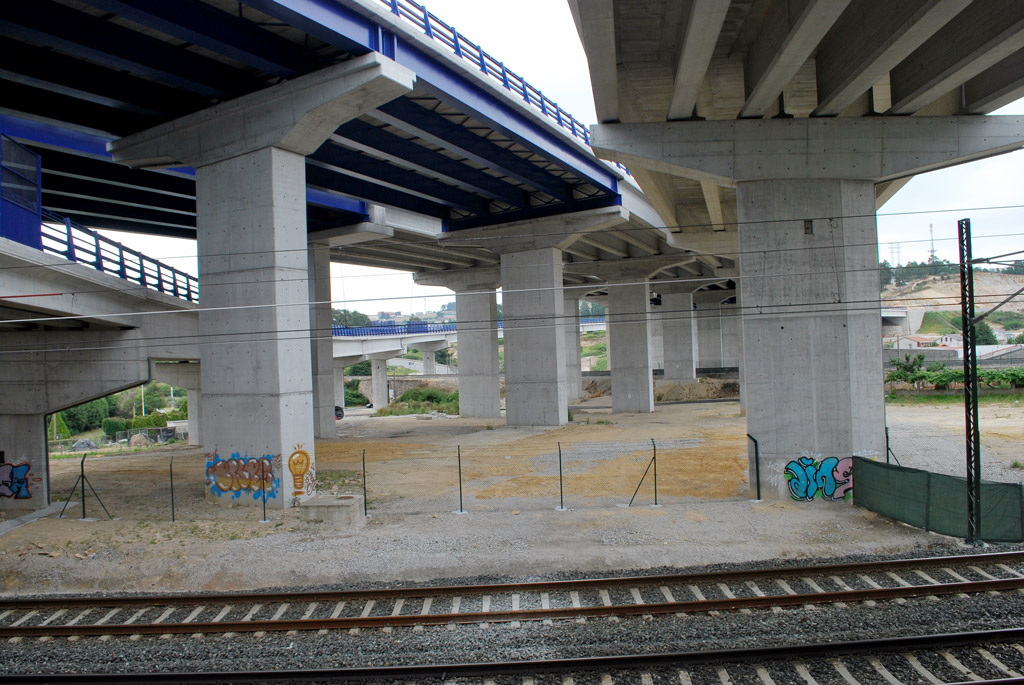 Vista dos viadutos da terceira ronda da Coruña no polígono de Pocomaco